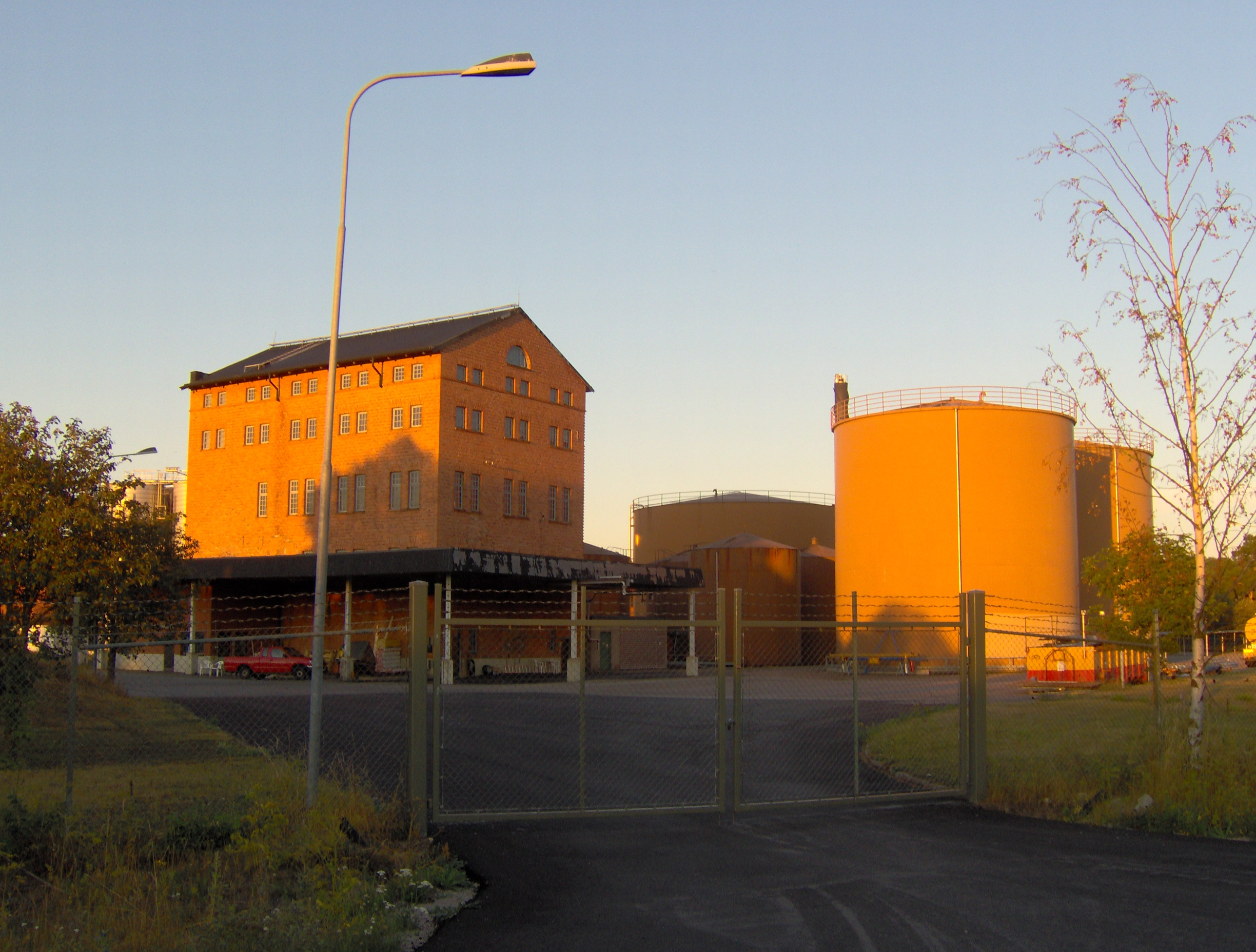 Jästbolaget i Rotebro